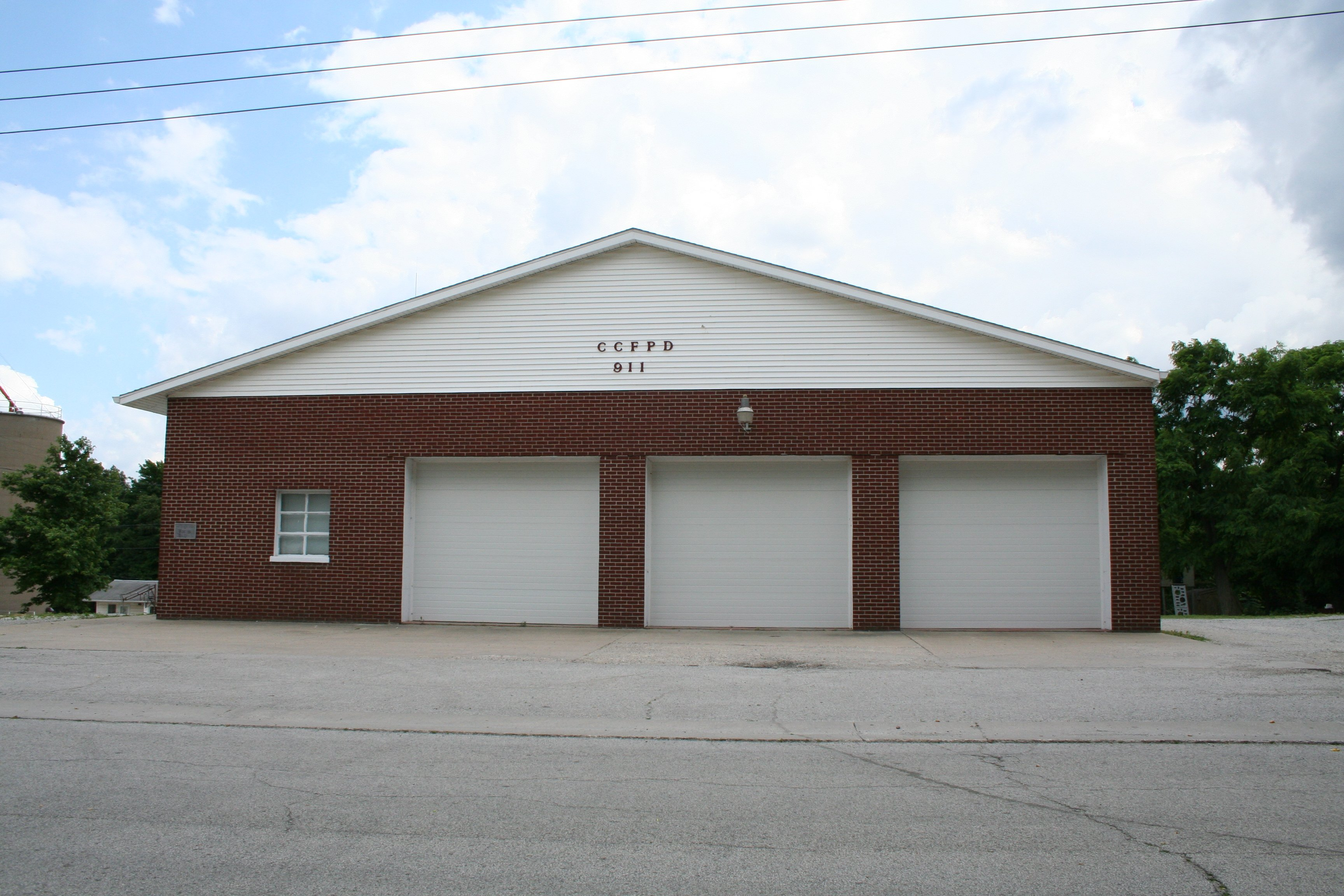 Camargo_Illinois_Fire_Station